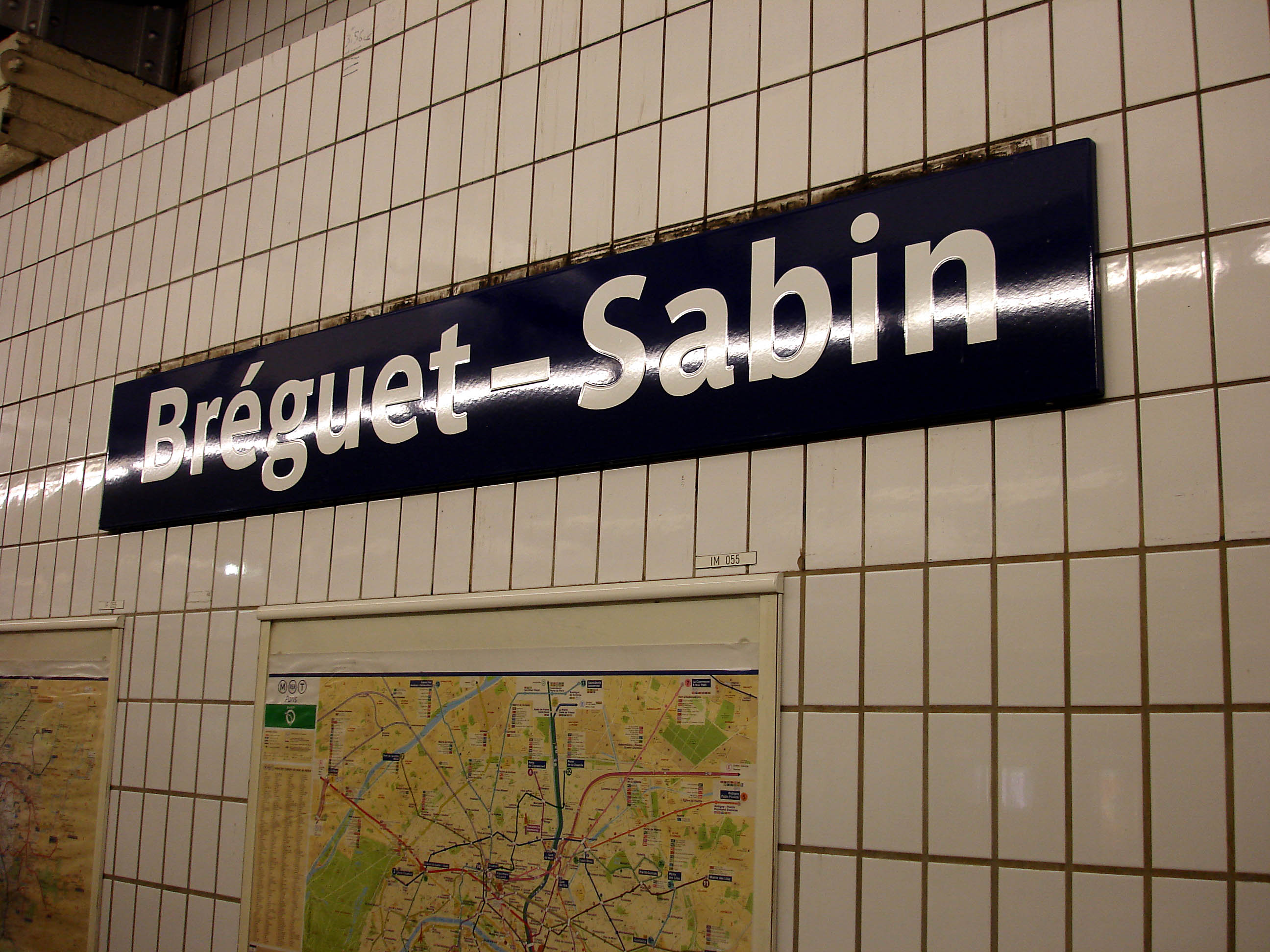 La station Bréguet - Sabin de la ligne 5 du métro de Paris, France